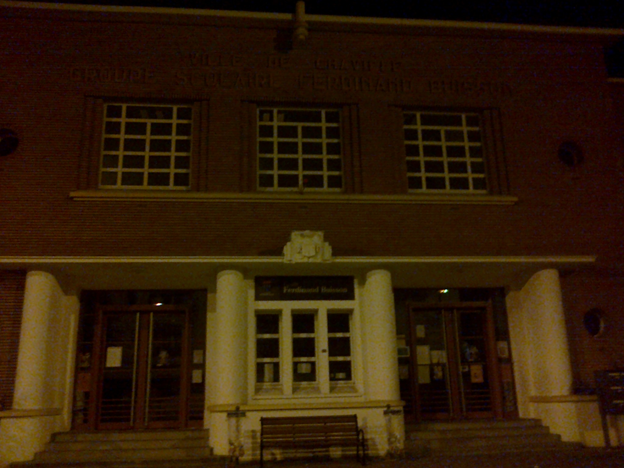 Ecole Ferdinand-Buisson à Chaville